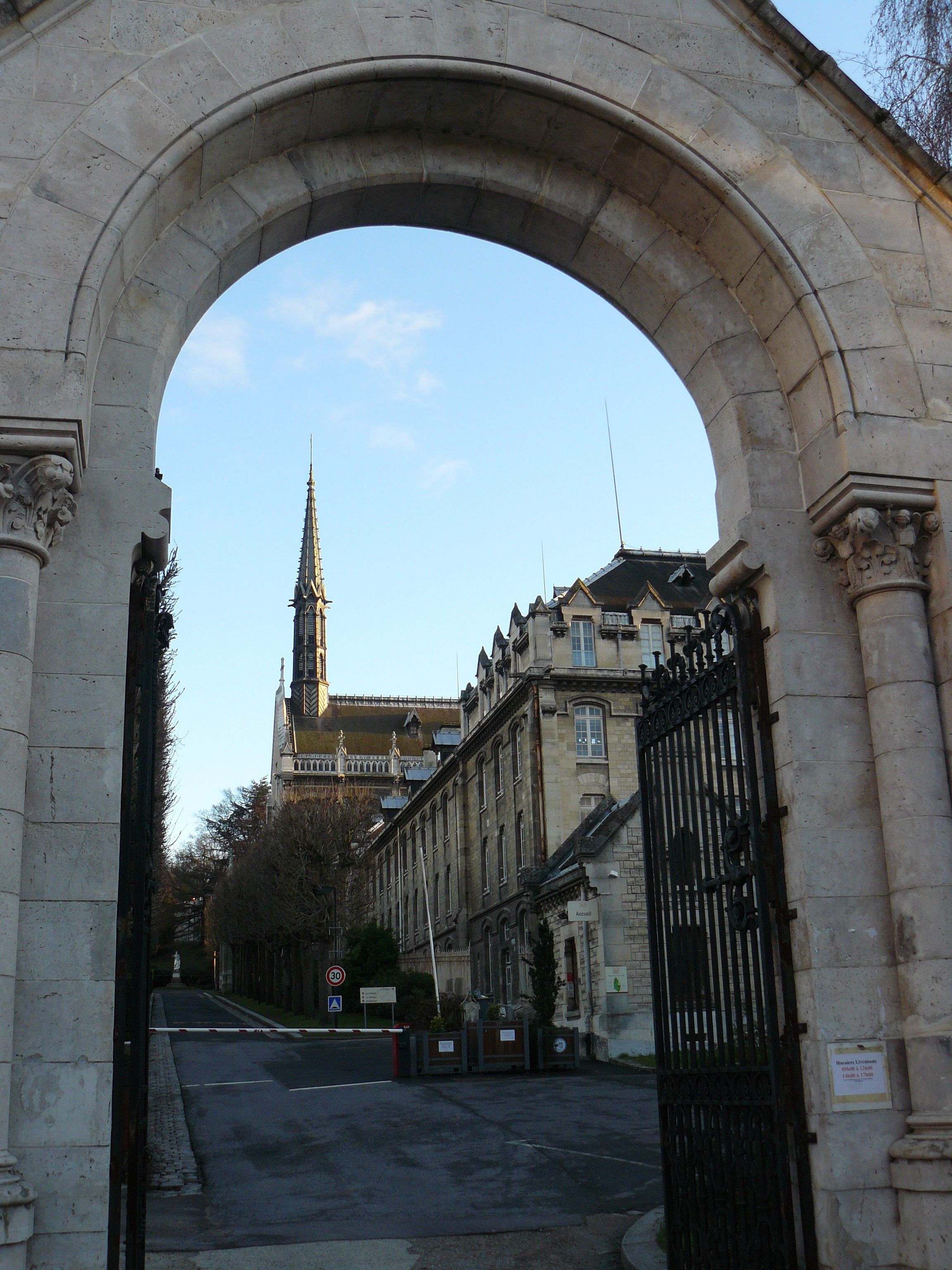 Entrée de l'orphelinat Saint Philippe à Meudon (Hauts-de-Seine, France)